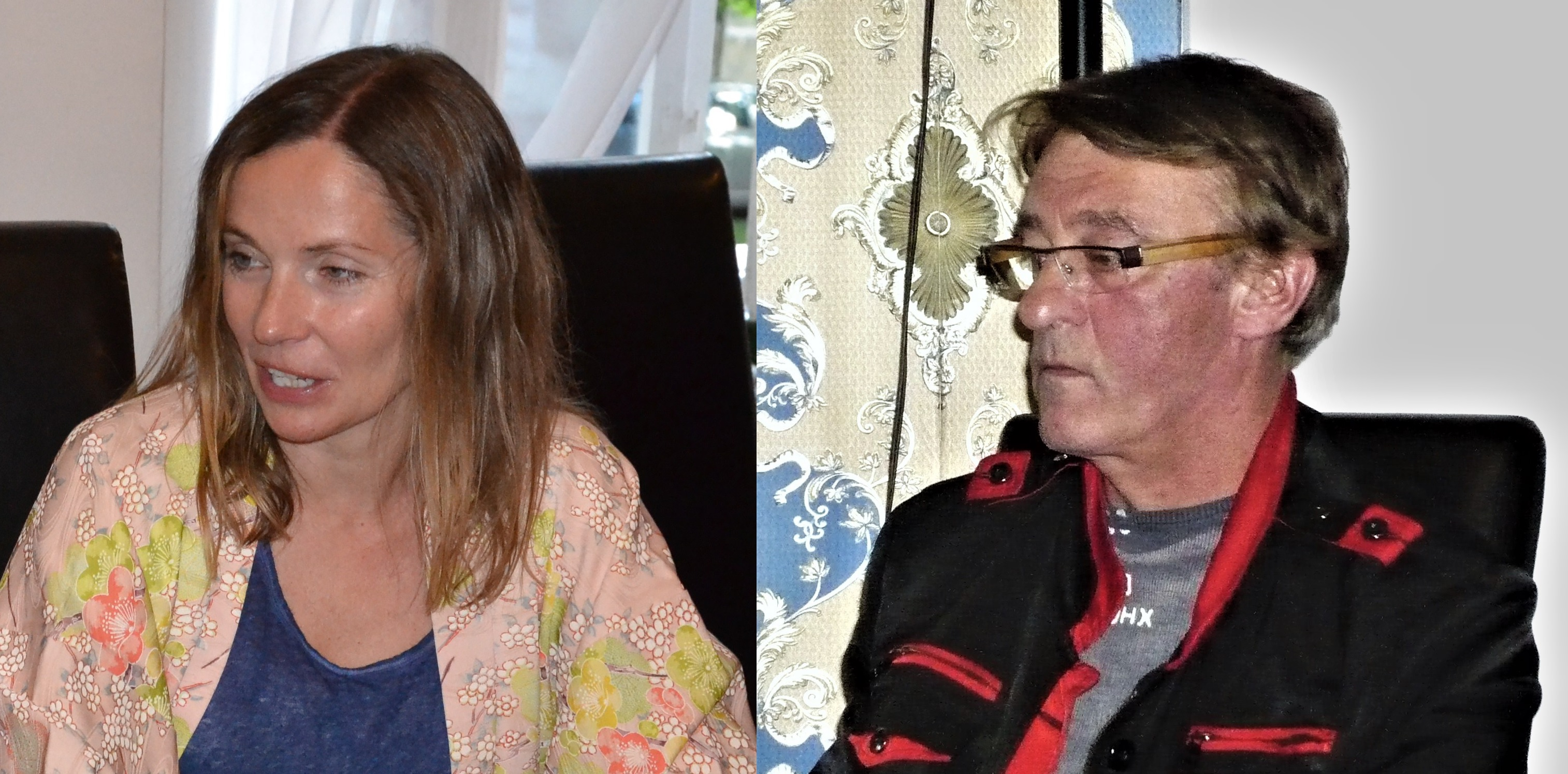 Joanna Bator, Janusz Rudnicki, I Festiwal Góry Literatury, 2015